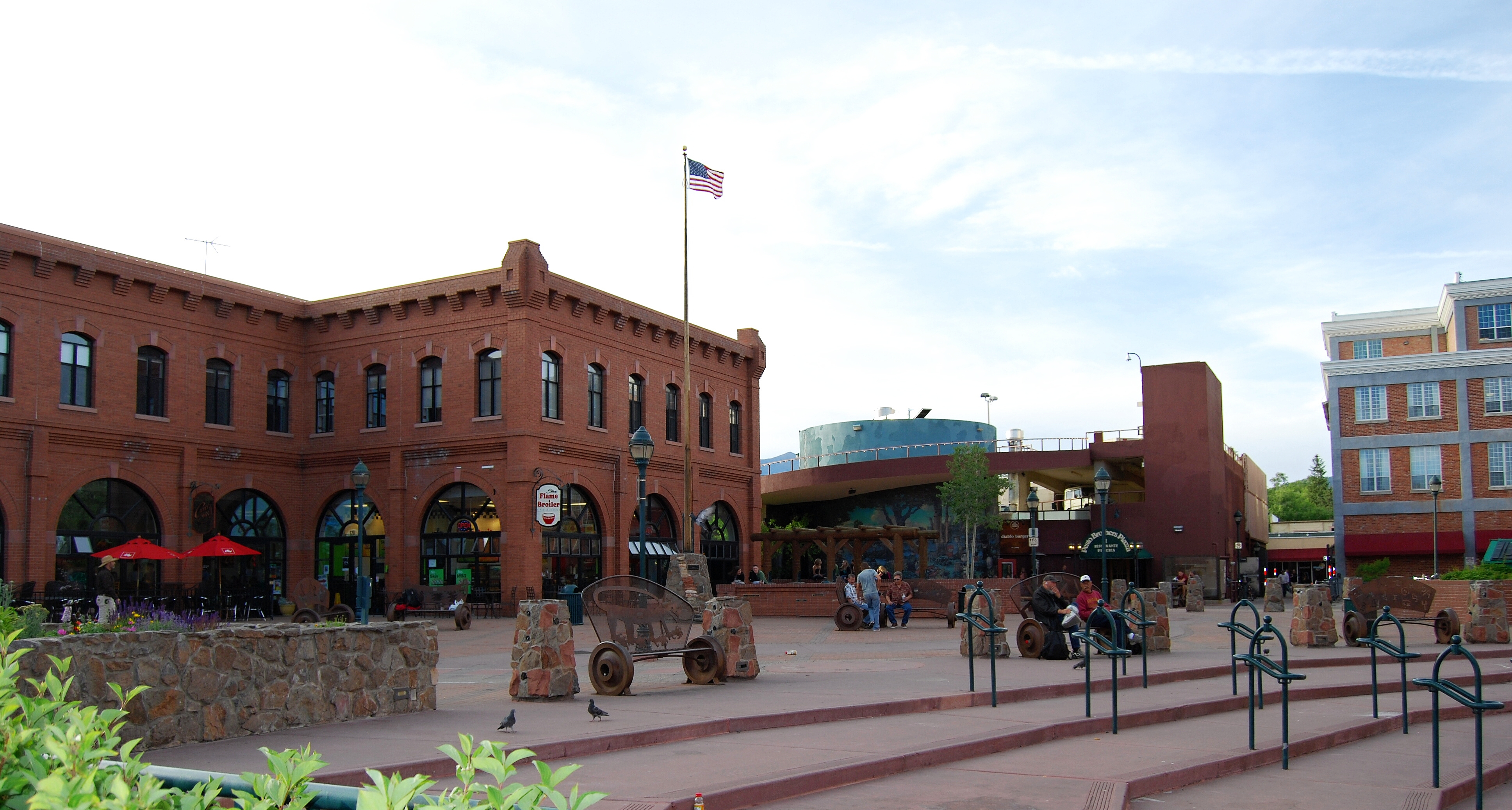 Flagstaff, Heritage Square